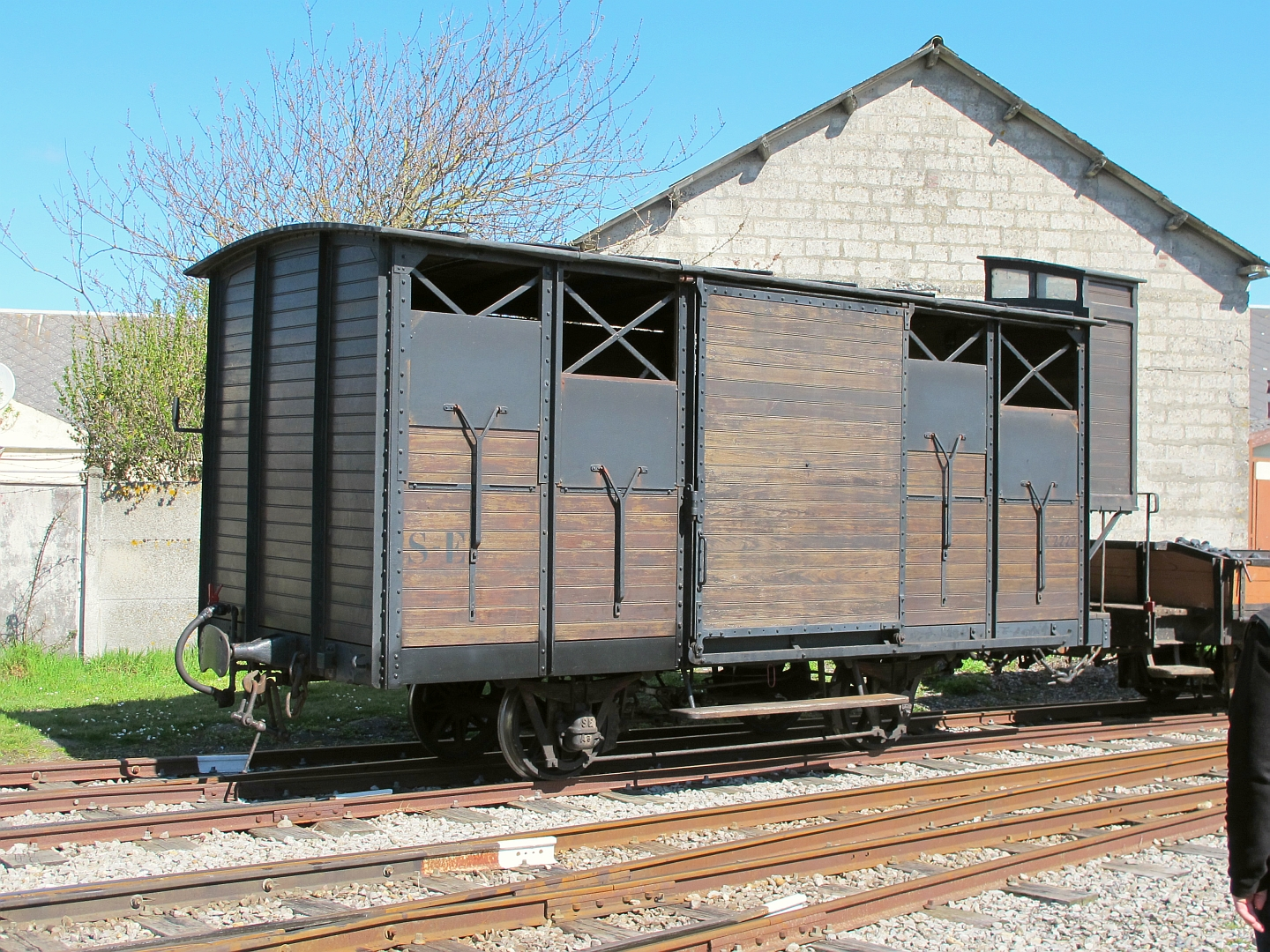 Le wagon couvert Kf 2222 en gare de Cayeux sur le chemin de fer de la baie de Somme le 17 avril 2016.